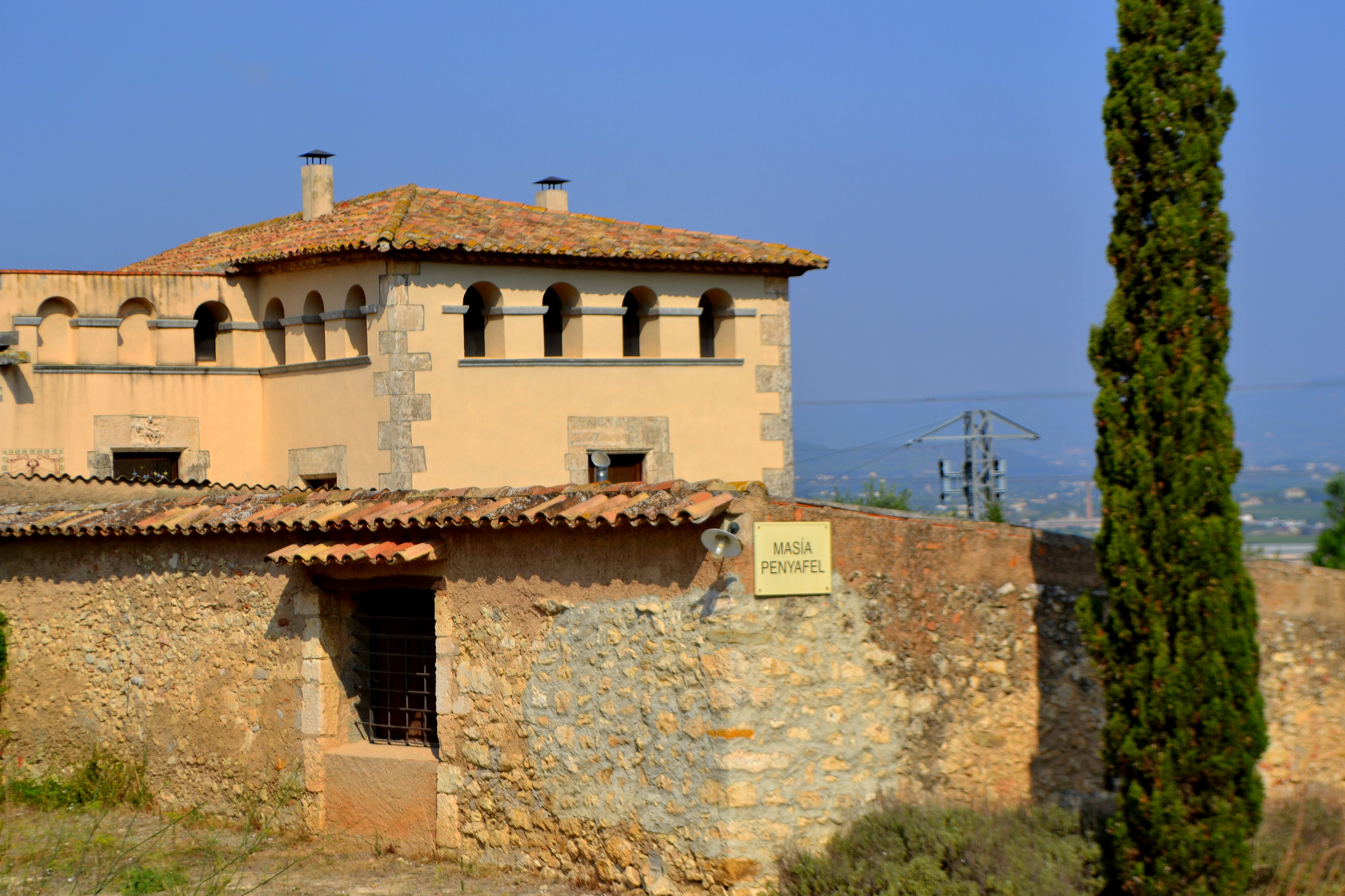 Masia de Penafel (Santa Margarida i els Monjos)